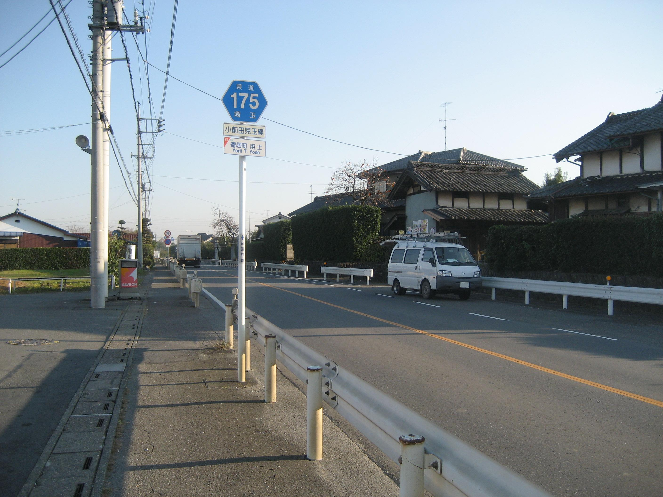 埼玉県道175号線寄居町内